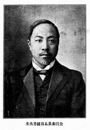 谷鍾秀肖像